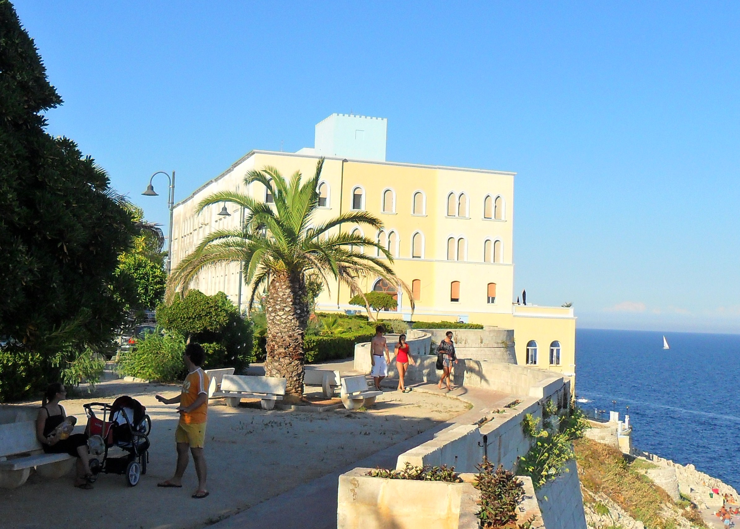 Palazzo Tamborino - Miramare a Santa Cesarea Terme